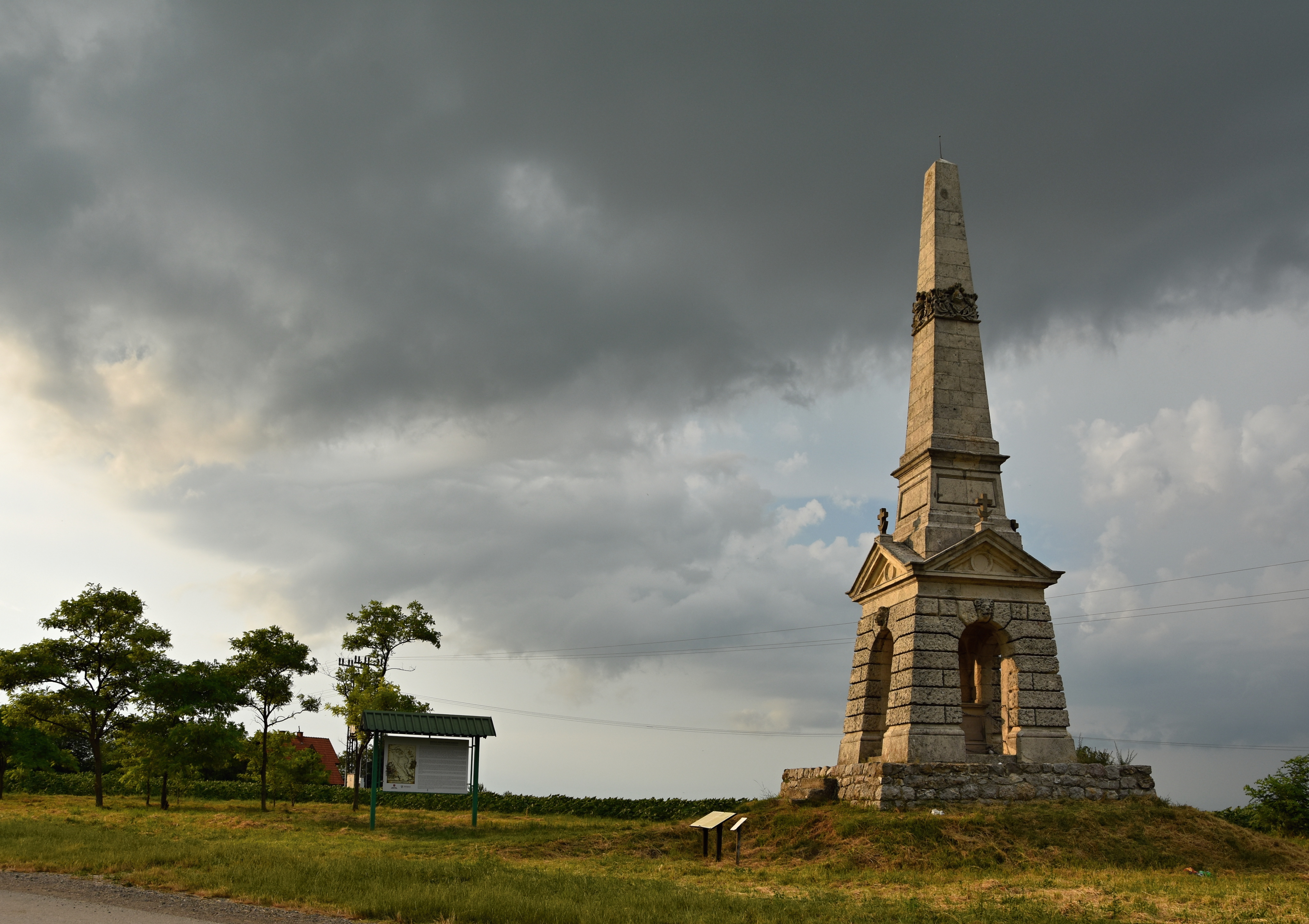 Stari Slankamen, Srbsko - pamätník z roku 1892 pripomínajúci bitku medzi rakúskymi a osmanskými vojskami pri Slankamene, ktorá sa uskutočnila 19. augusta roku 1691 a skončila porážkou osmanských vojsk